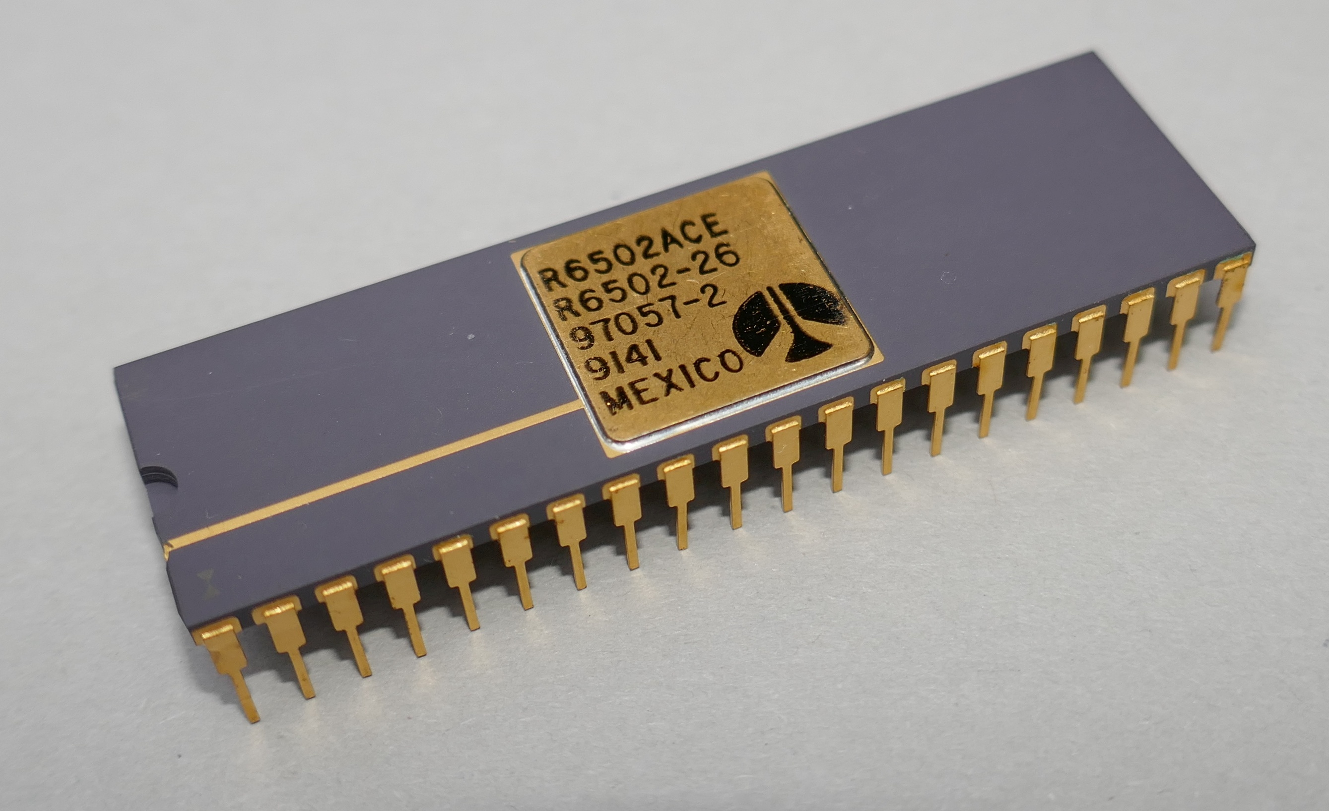 IC Rockwell R6502ACE, Seitenansicht